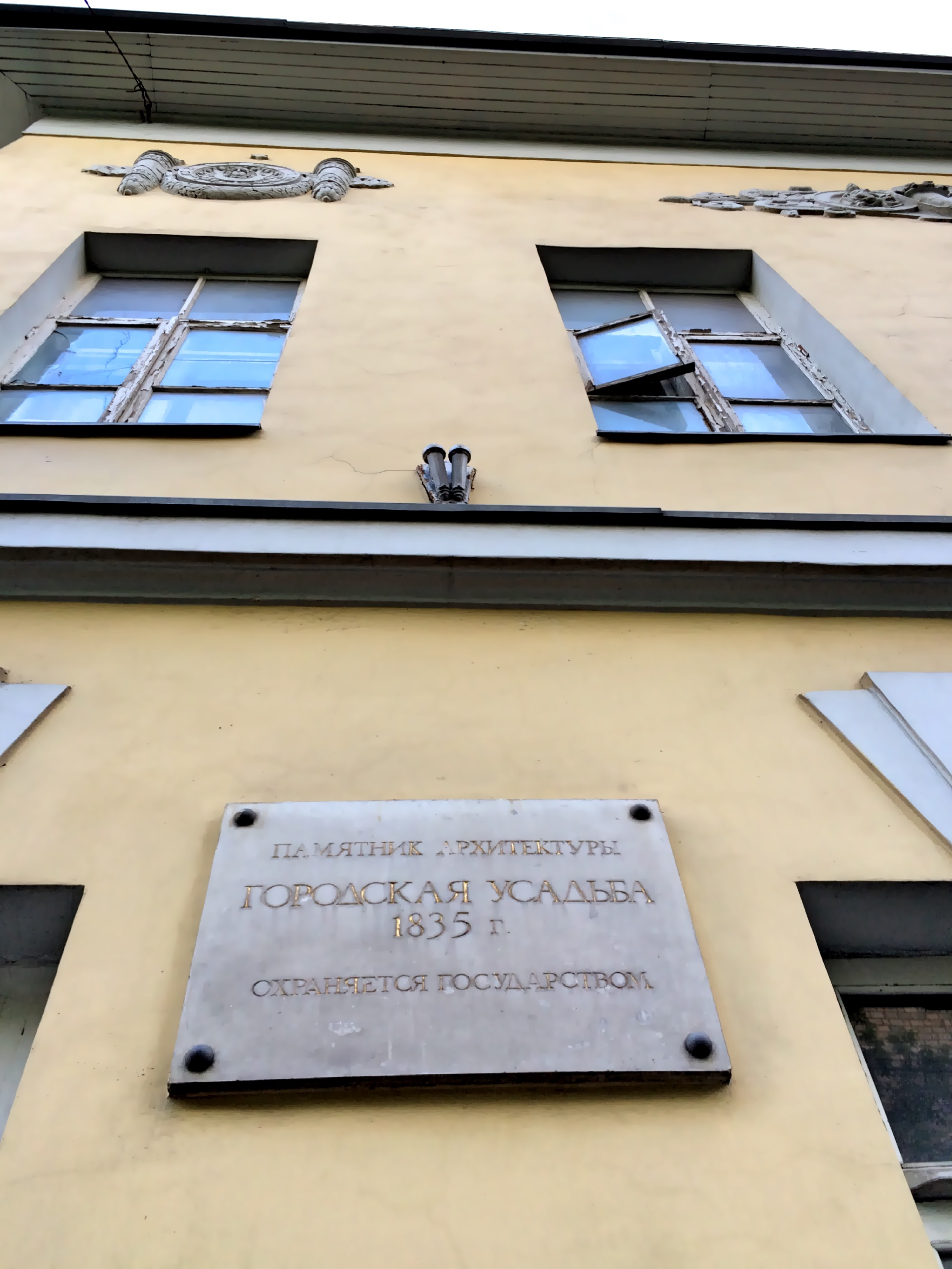 Starpmonetny st.